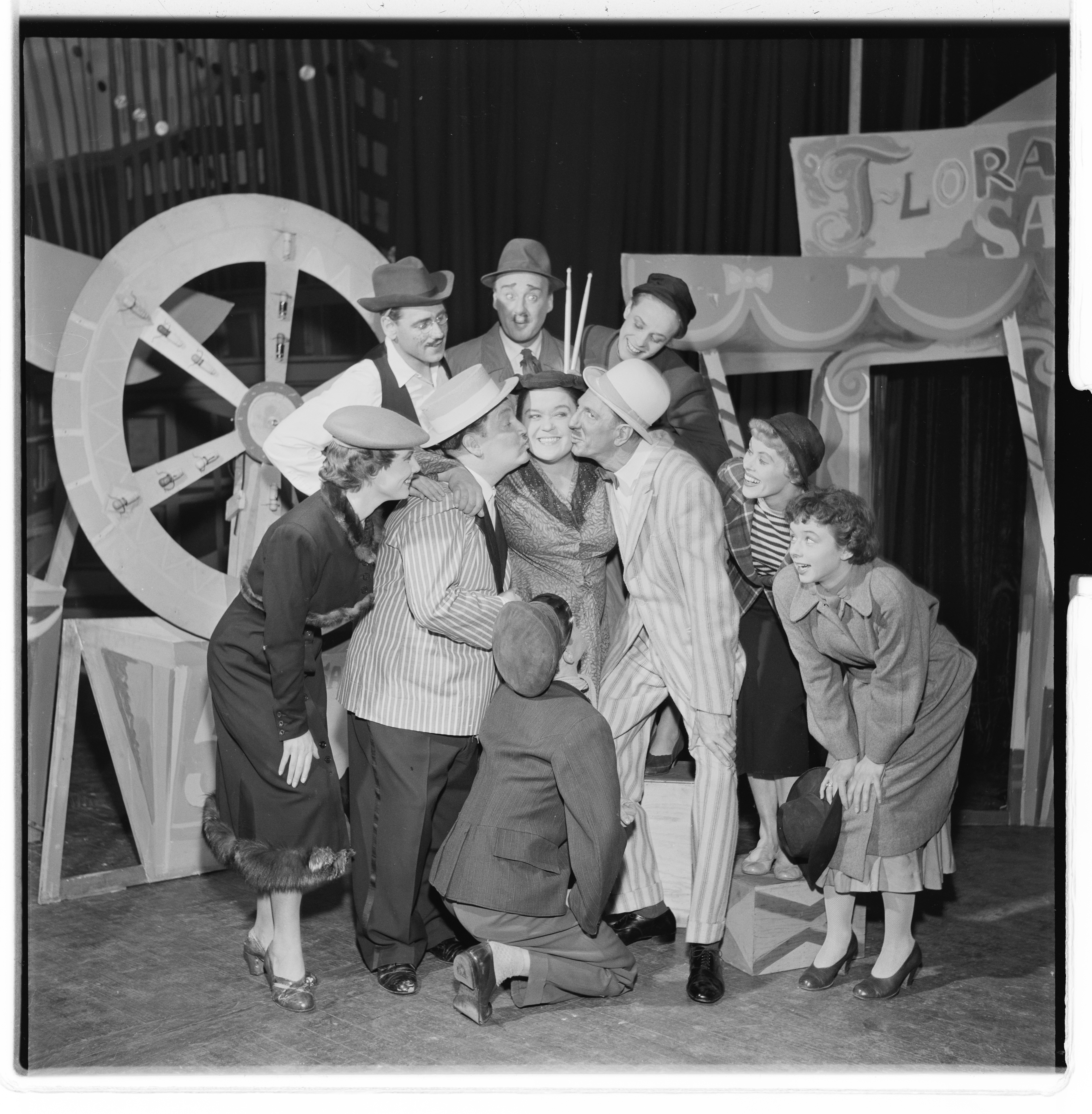 Bildet er hentet fra Arkivverket. Kari Diesen, 25-års scenejubileum. NÅ nr. 21, 1955 Arkivinstitusjon : Riksarkivet Arkivnavn : Billedbladet NÅ Sted : Norge, Oslo, Oslo, Emneord: Skuespillere, Teater, Revy Avbildet: Diesen, Kari;Juster, Leif